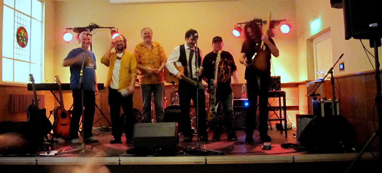 Slovakian folk-rock group Prešporok. Photo from the concert at Apponyi palace in Bratislava